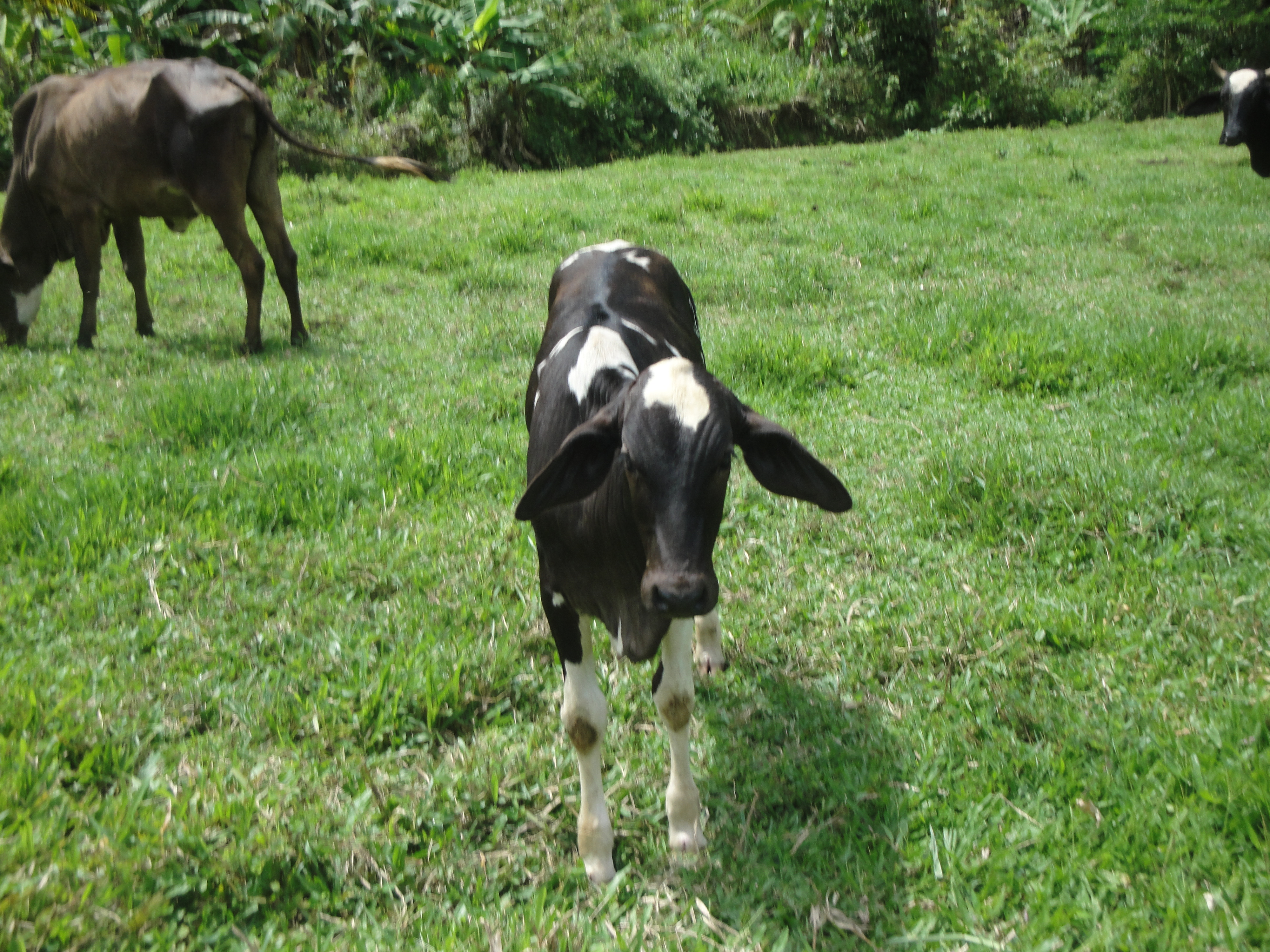 Um vitelo em um campo de Cachoeiras de Macacu.